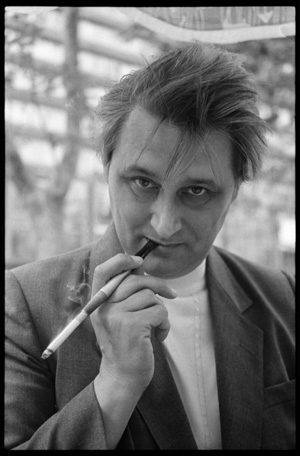 Lakatos István portréja (Budapest, 1987)